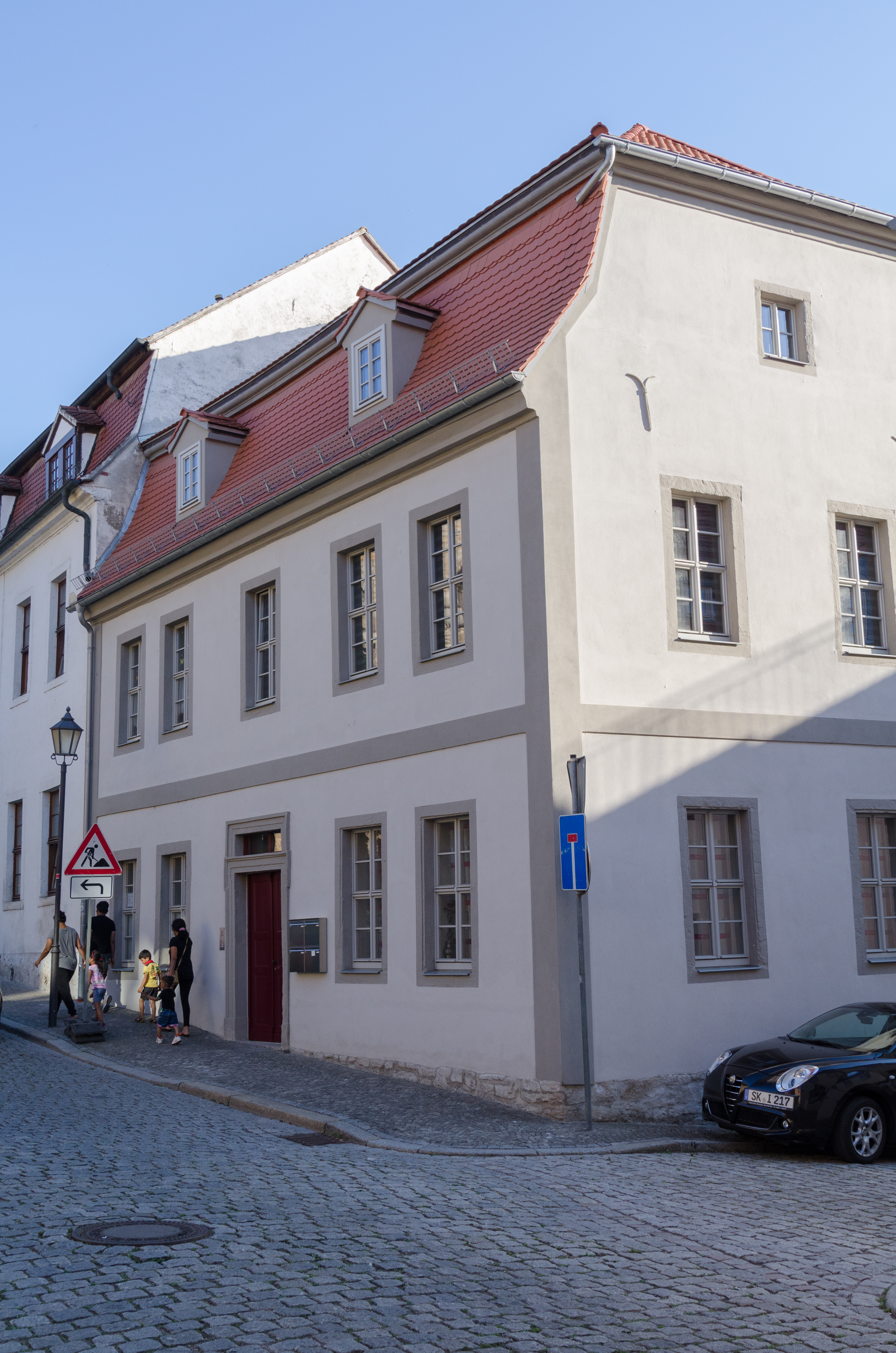 Merseburg, Domstraße 12